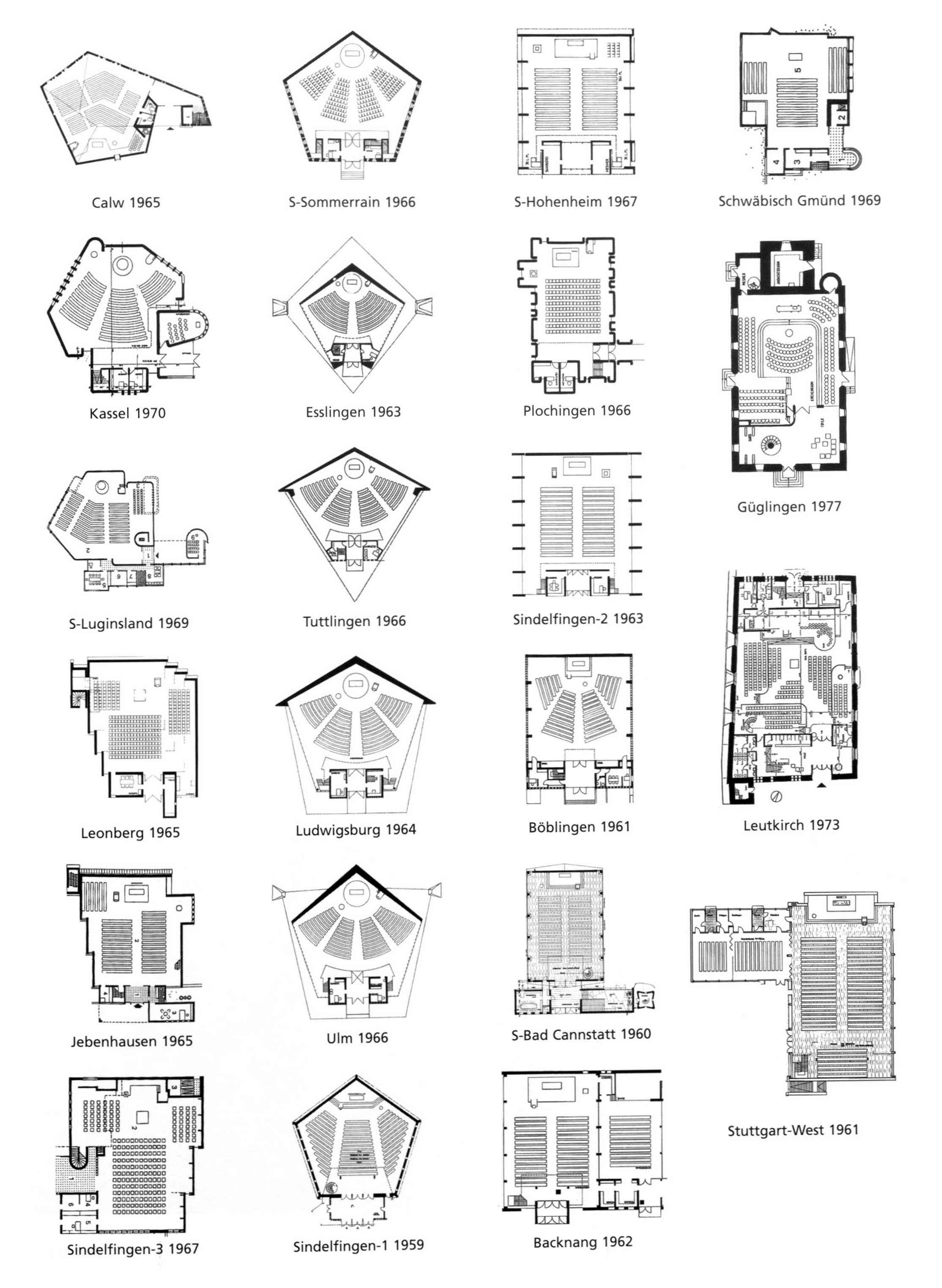 Grundrisstypologie der 22 von Heinz Rall zwischen 1959 und 1977 erbauten evangelischen Kirchen.